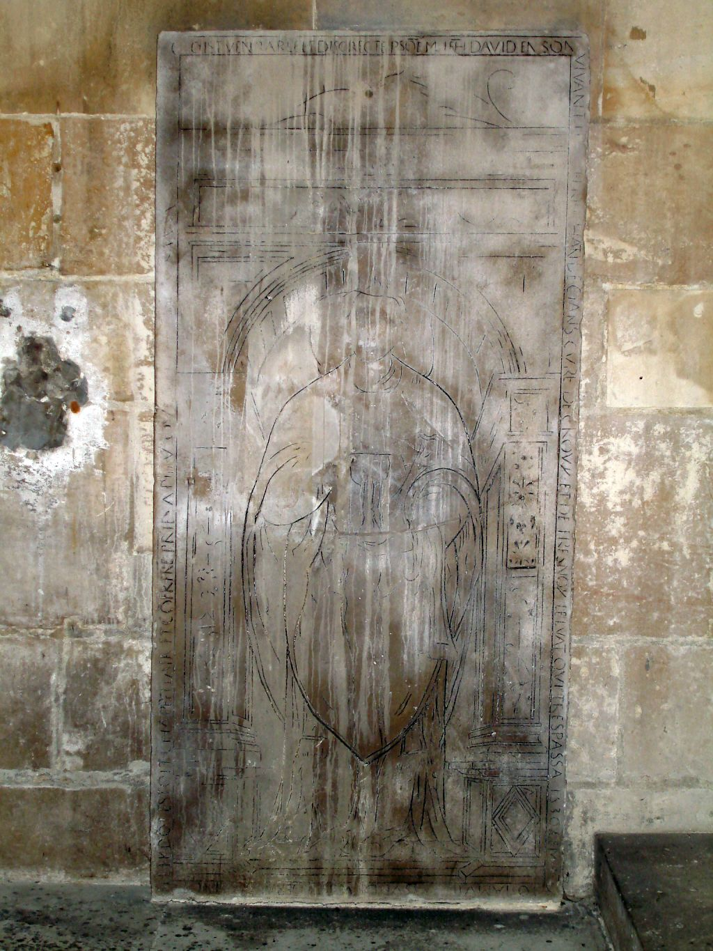 Dalle funéraire - Collégiale saint-Martin de Montmorency, Val-d'Oise (France) - Juillet 2006 Photo personnelle de clicsouris